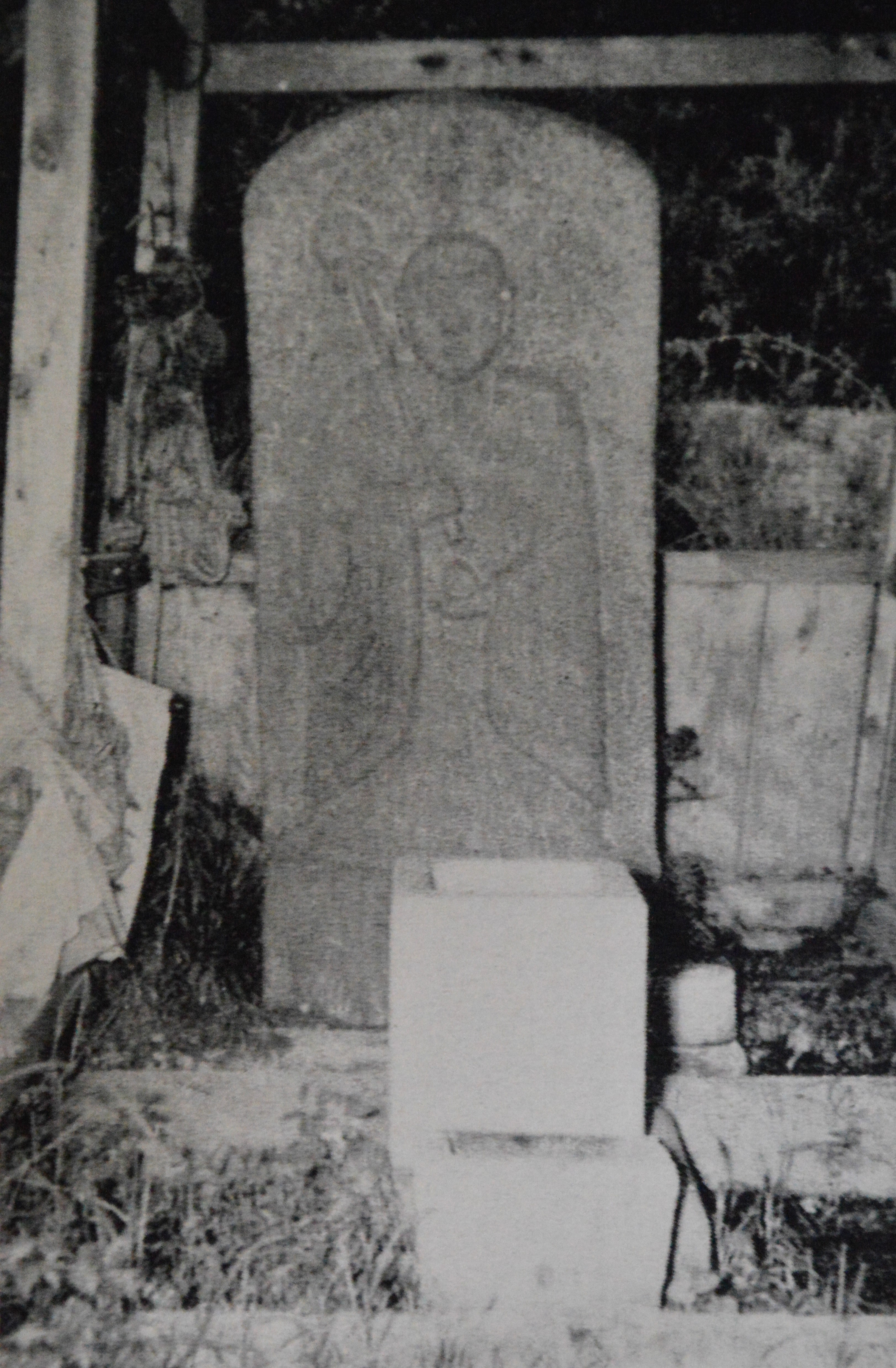 春日井市大泉寺町にある尻冷し地蔵（尻冷やし地蔵）。1958年頃。